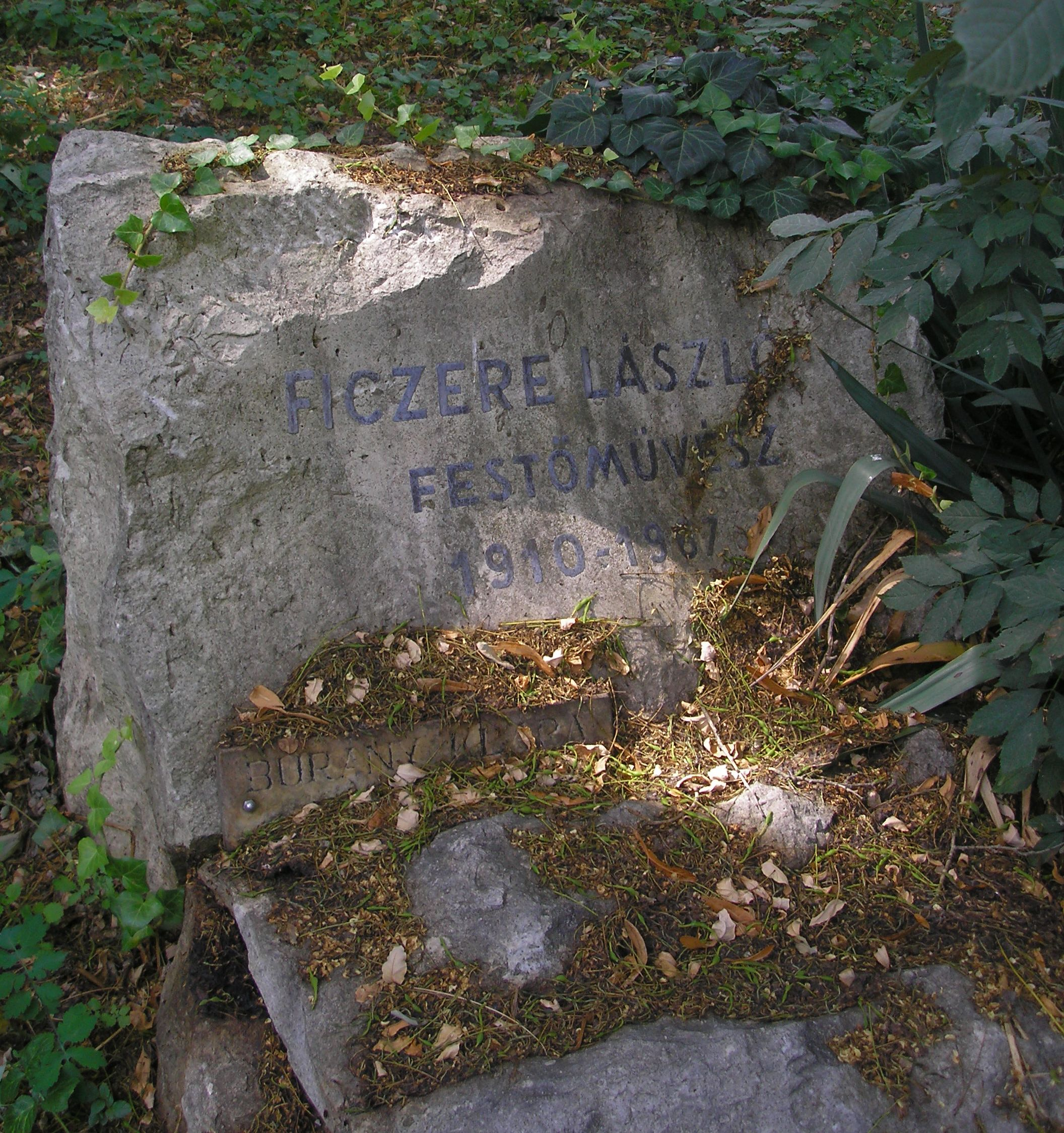 Ficzere László (1910–1967) sírja (Miskolc, Avasi temető)